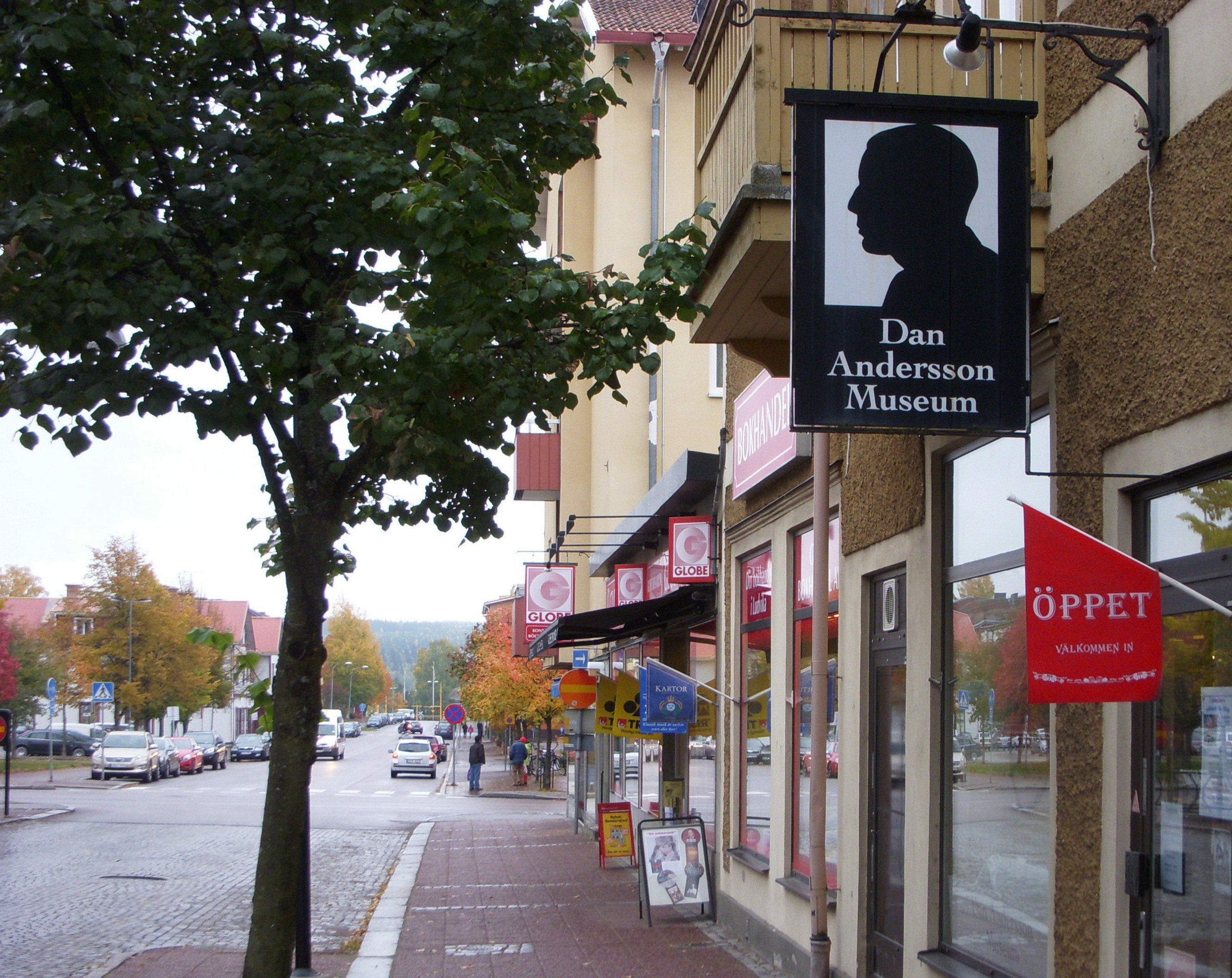 Dan Andersson museum